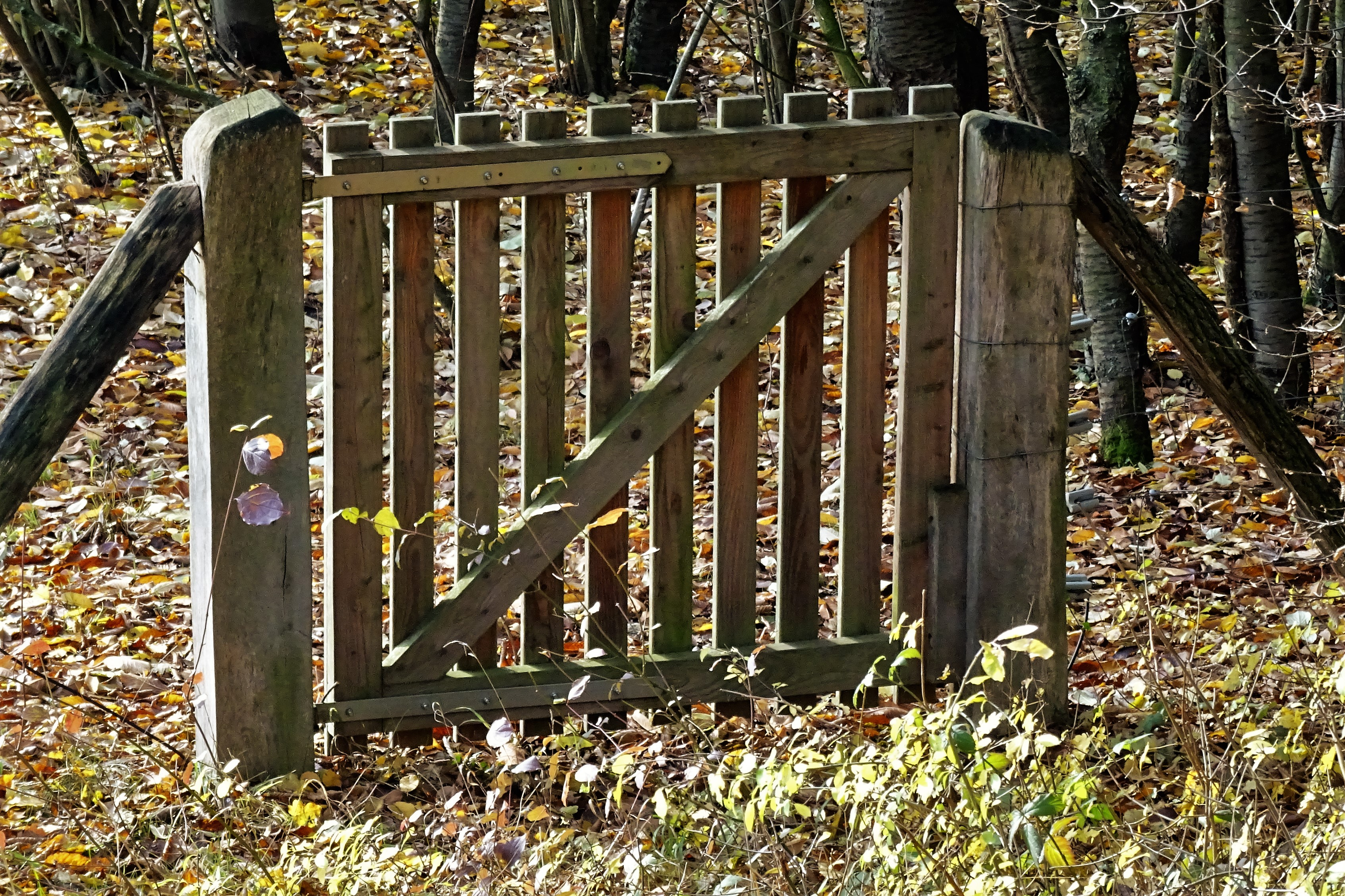 NSG HA 107 Weinberg bei Rühle (22)